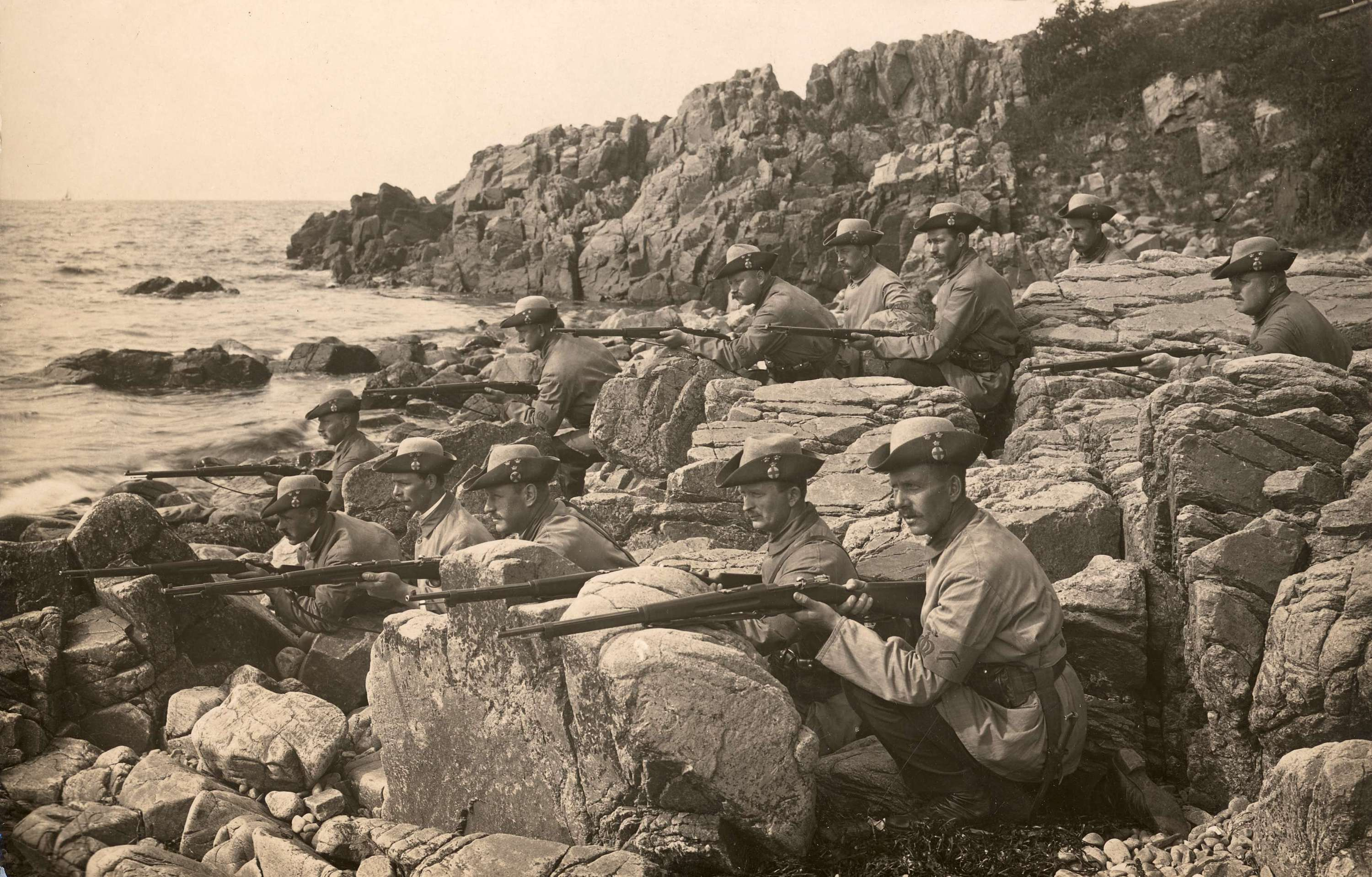 Män ur Landstormen på en klippig strand. Värnpliktsuppbåd omfattande de äldsta värnpliktsklasserna i tidigare svensk försvarsorganisation. IDENTIFIKATIONSNUMMER NMA.0033460 INGÅR I SAMLING Nordiska museets arkiv